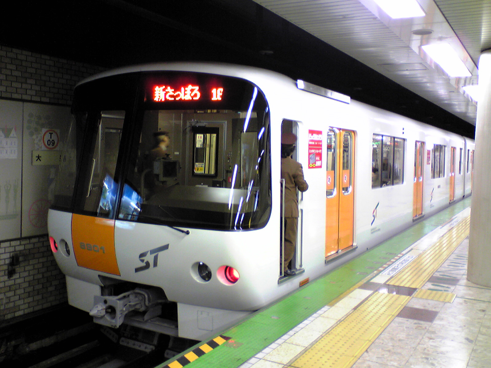 大通駅で撮影した、札幌市営地下鉄東西線8000形801号車